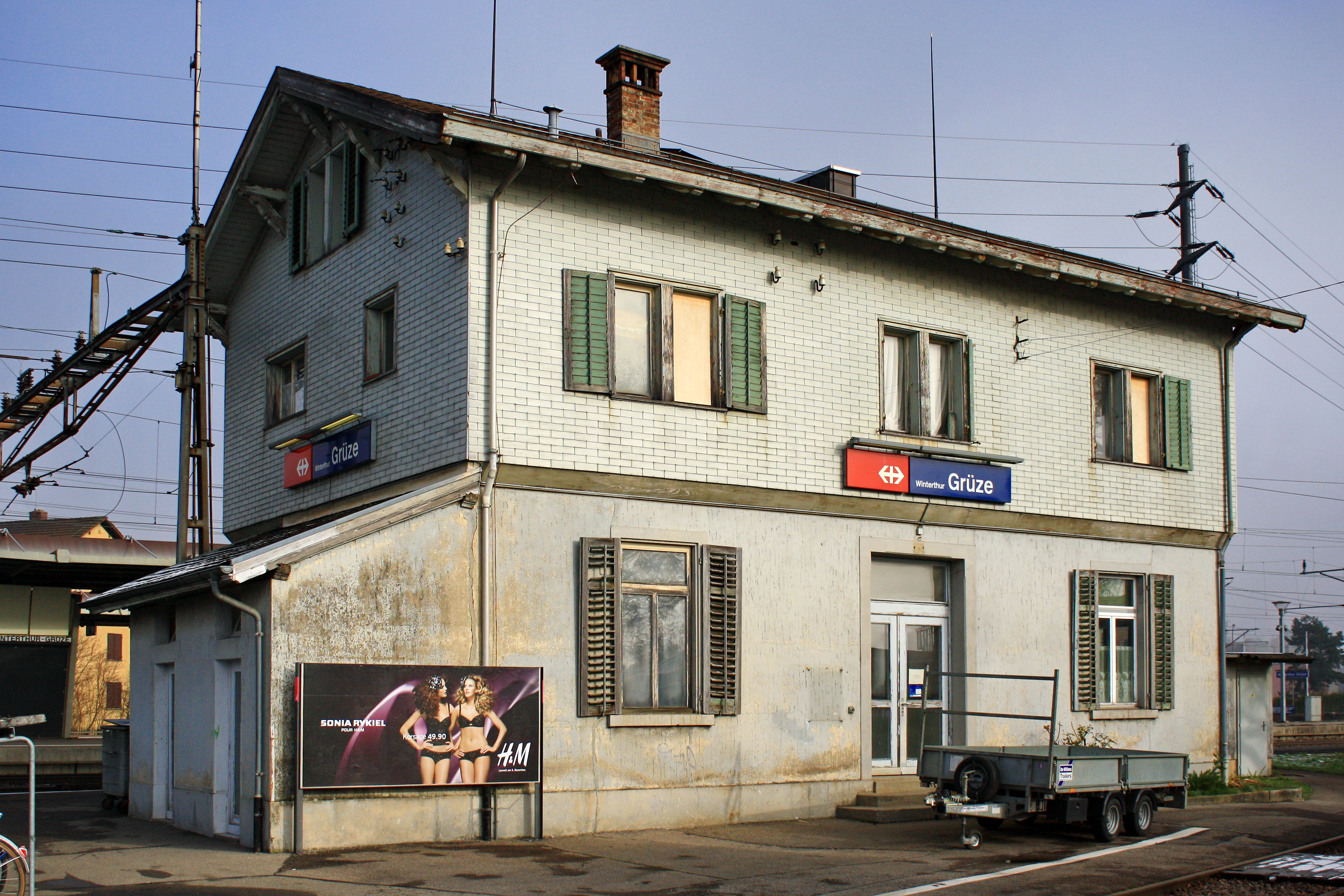 in Winterthur-Grüze (Switzerland)